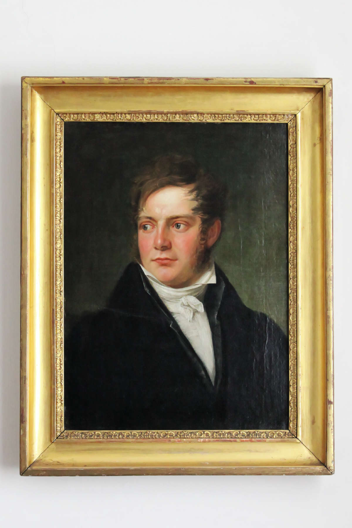 Aachen, Couven-Museum, Portrait des Aachener Stadtbaumeisters Adam Franz Friedrich Leydel von Johann Baptist Joseph Bastiné